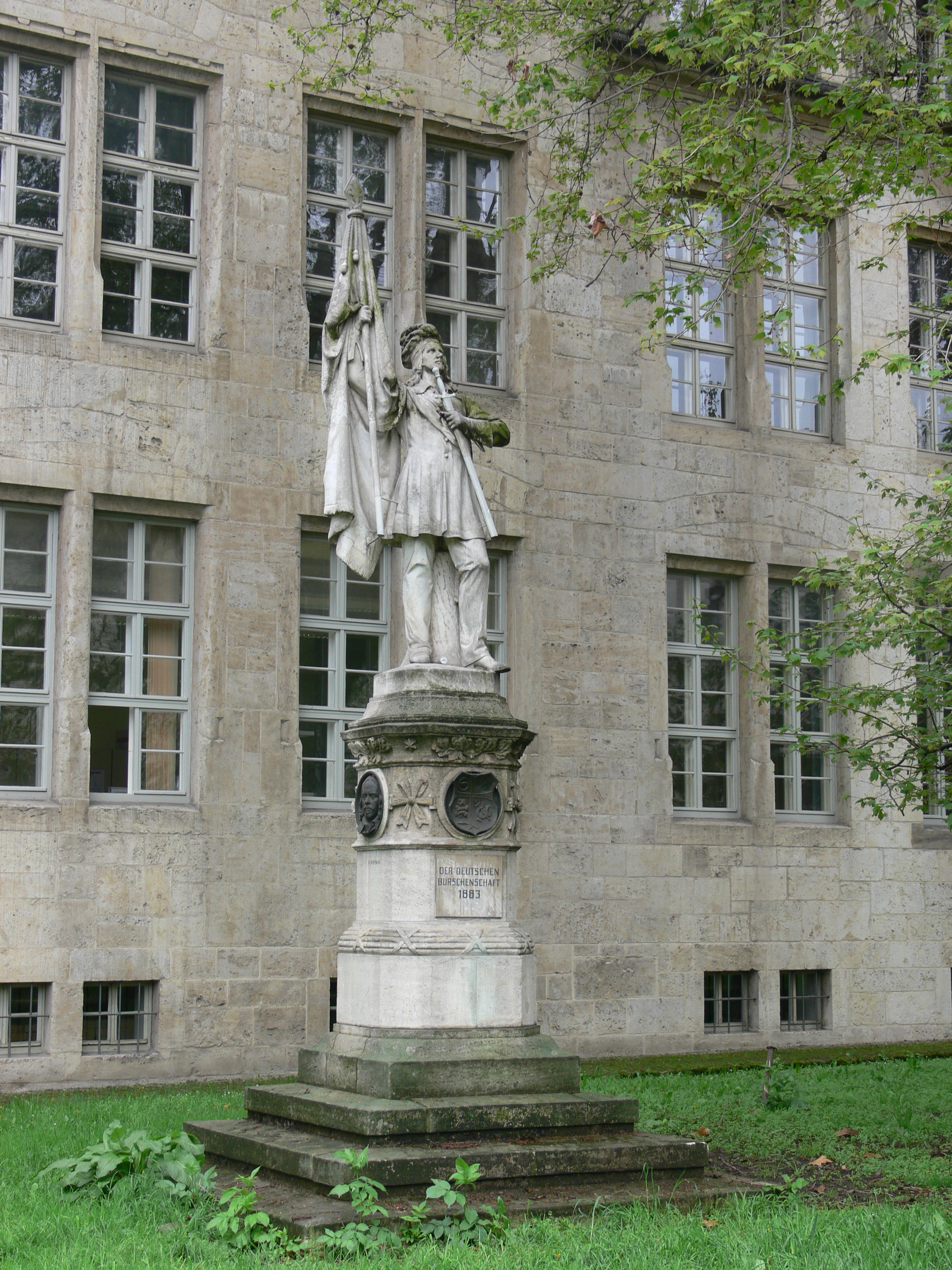 Jena: Burschenschaftsdenkmal am Fürstengraben vor dem Universitätshauptgebäude